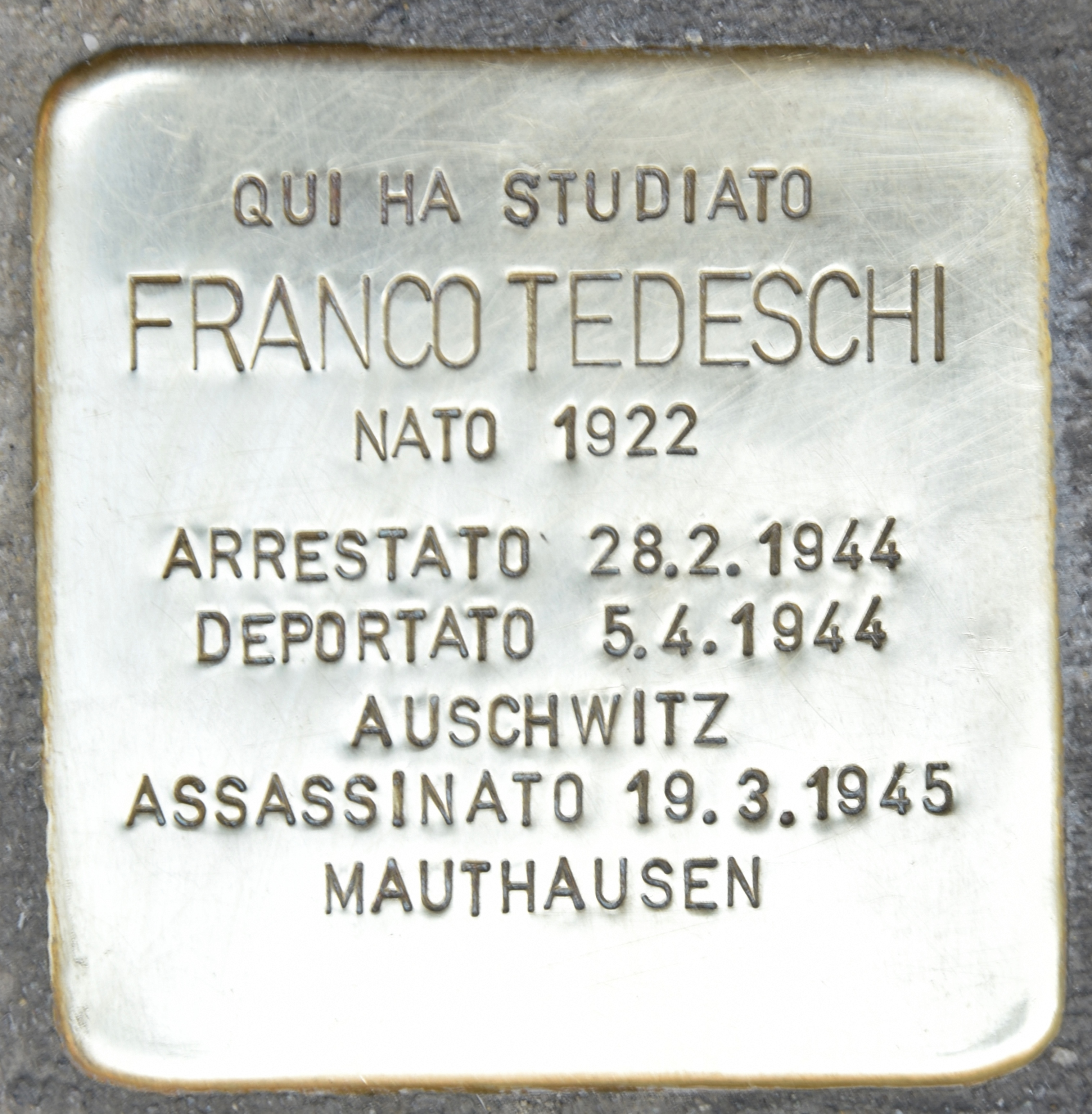 Stolperstein für Franco Tedeschi